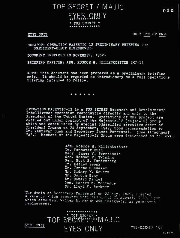 Druga strona odtajnionej dokumentacji